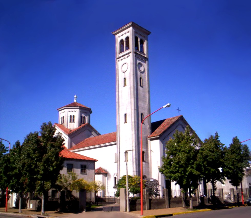 Iglesia Sagrado Corazón, en el barrio Belgrano de la ciudad de Junín, Argentina.